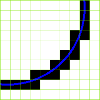 Verdeutlichung des Begriffs Subpixel